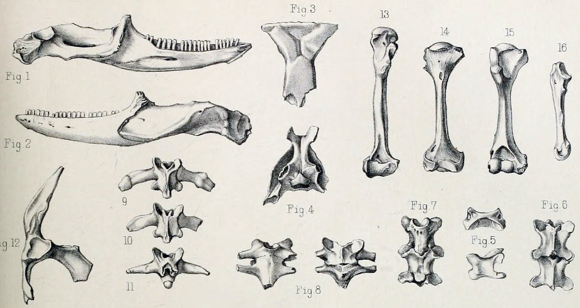 Fossils of Leiolopisma mauritiana.